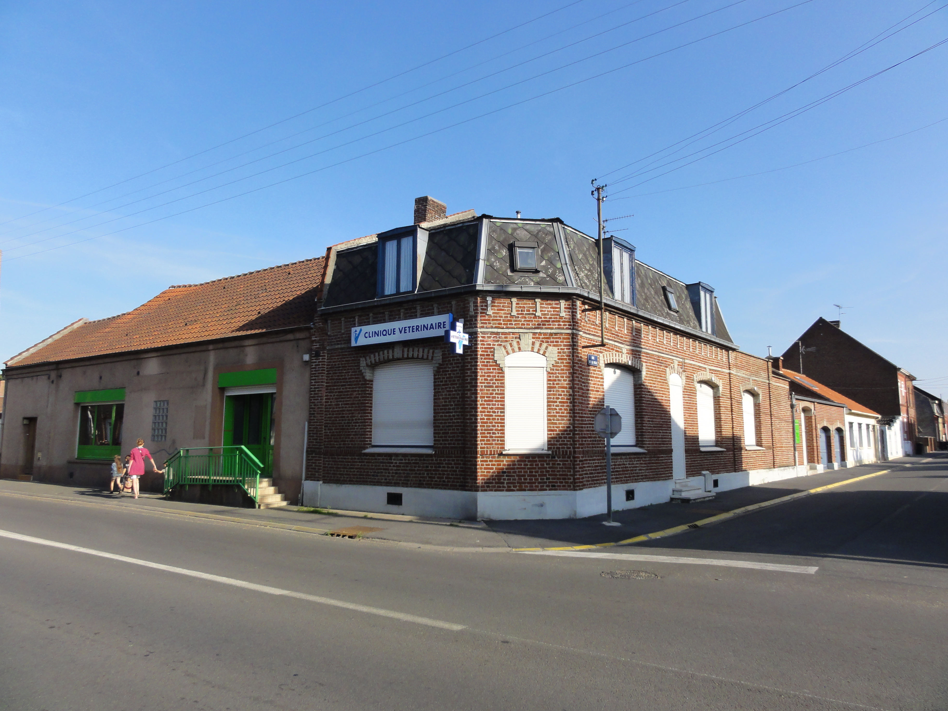 L'Avaleresse Aglaé de la Compagnie des mines d'Aniche était un puits sans exploitation situé à Auberchicourt, Nord, Nord-Pas-de-Calais, France.